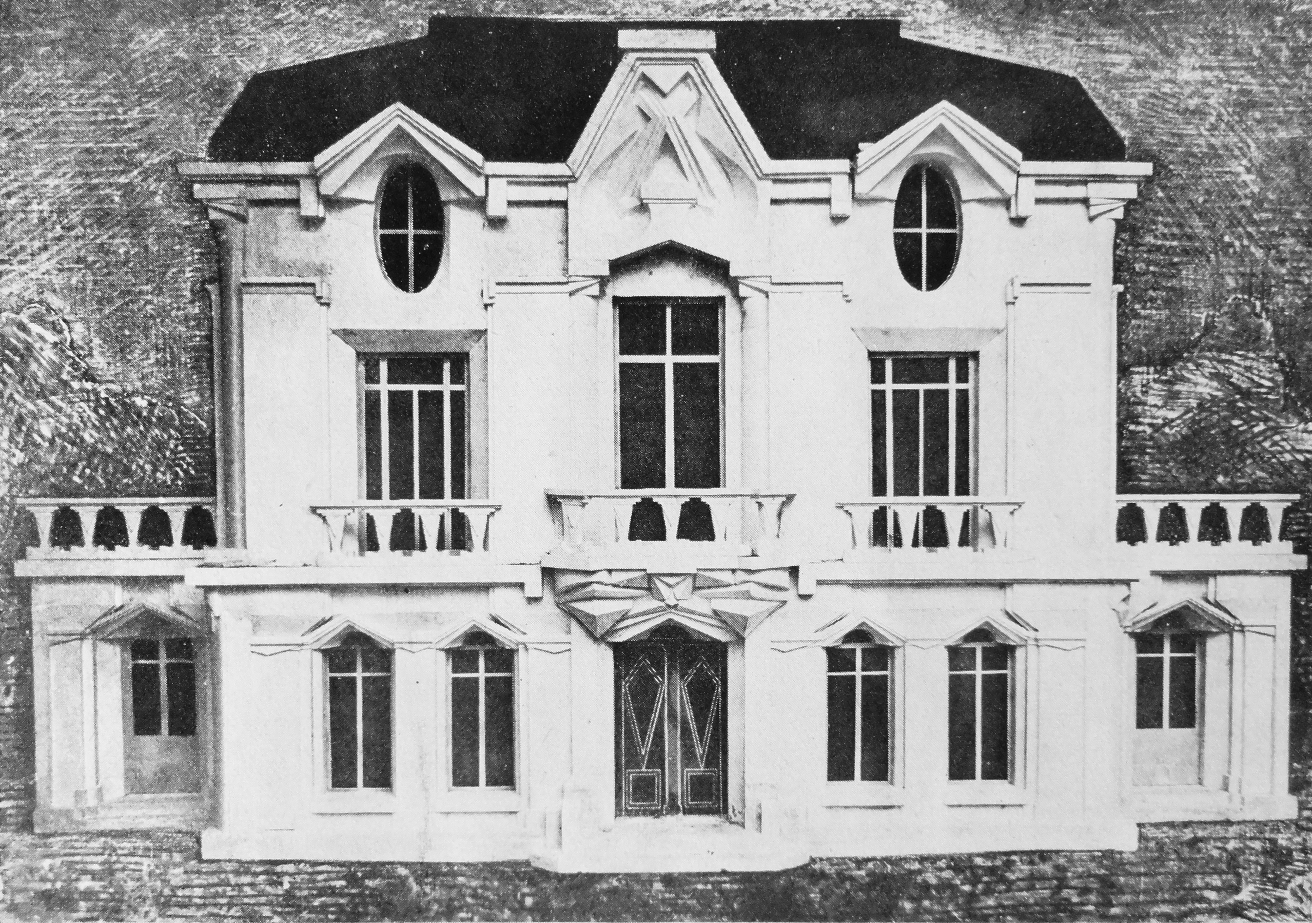 Raymond Duchamp-Villon, 1912, Projet d'hôtel, Maquette de la façade de la Maison Cubiste (Cubist House), reproduced in Les Peintres Cubistes, 1913